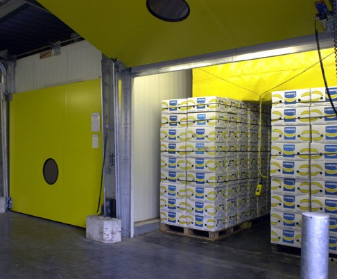 Ett Bananmogningsrum